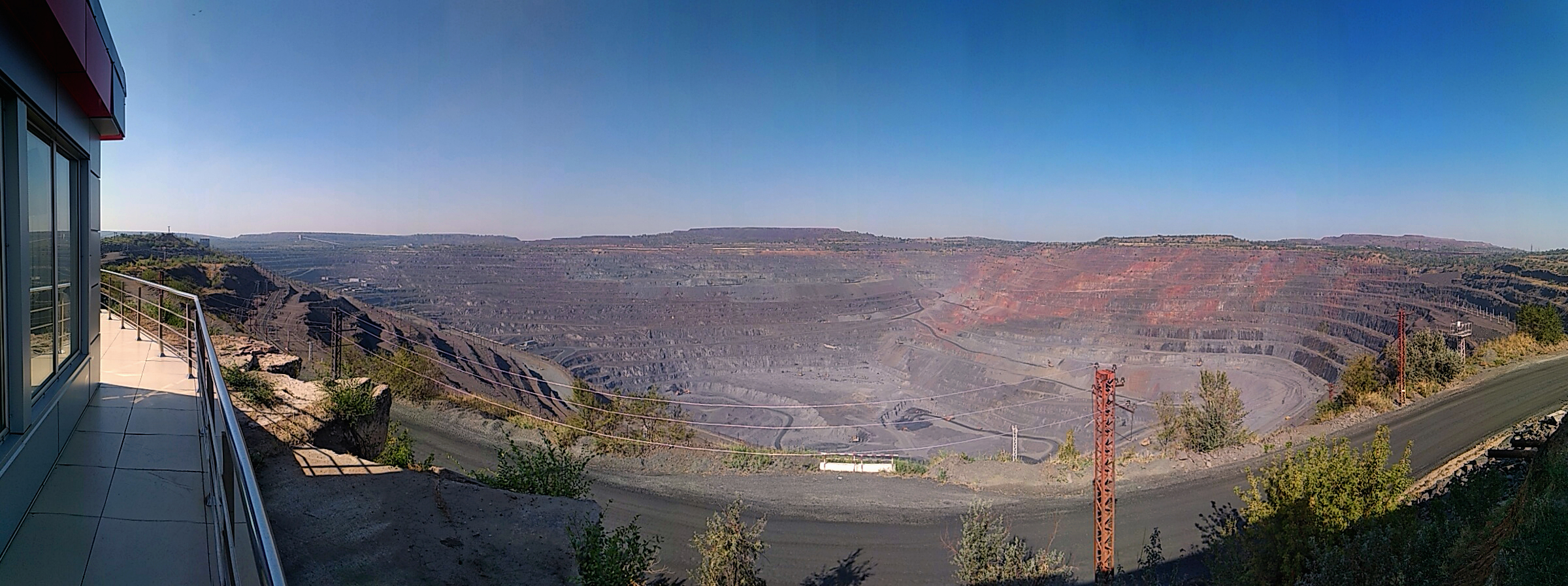 Карьер